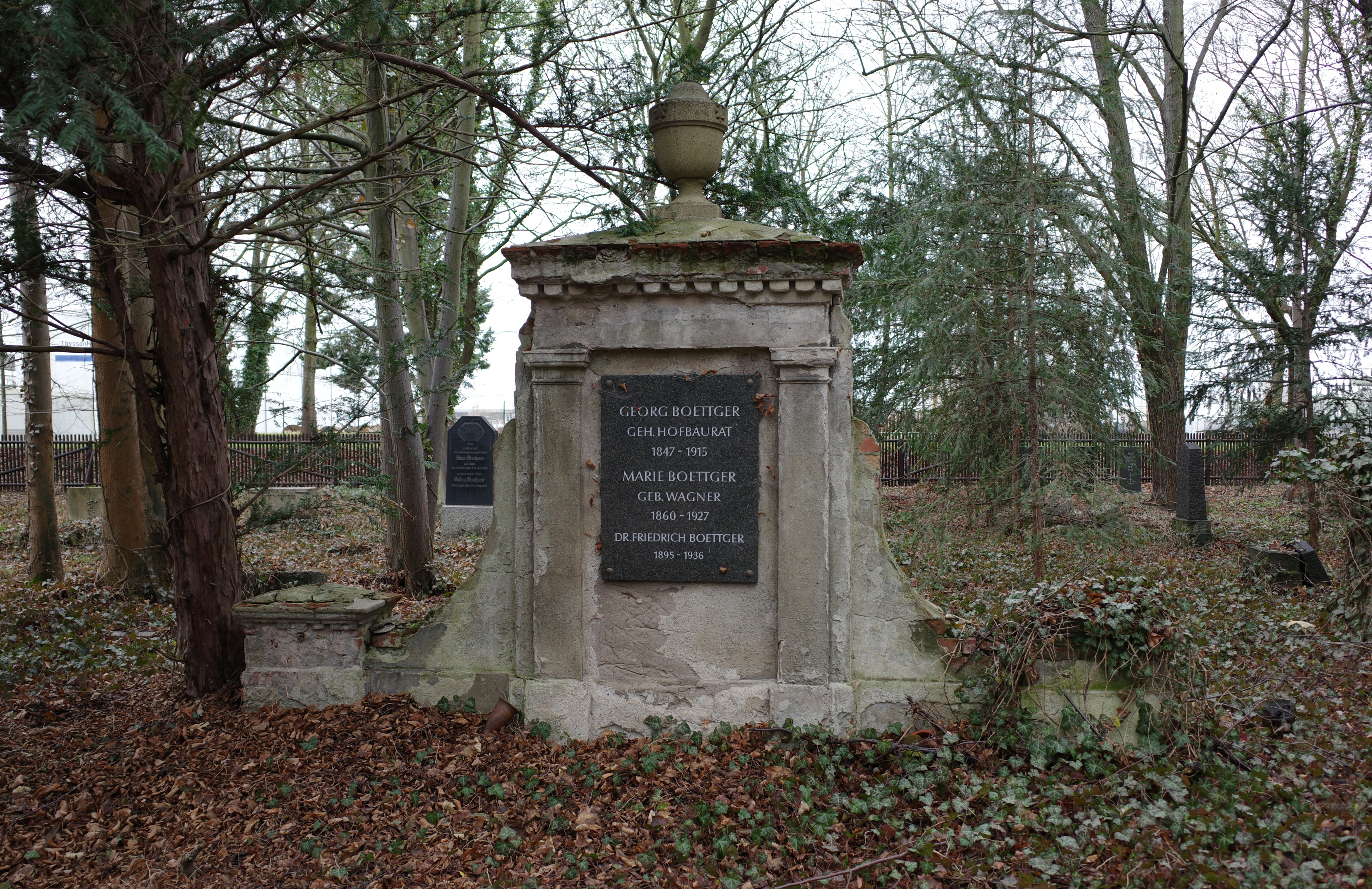 Dessau-Roßlau, Ruhestätte von Georg Boettger auf dem Friedhof 3.